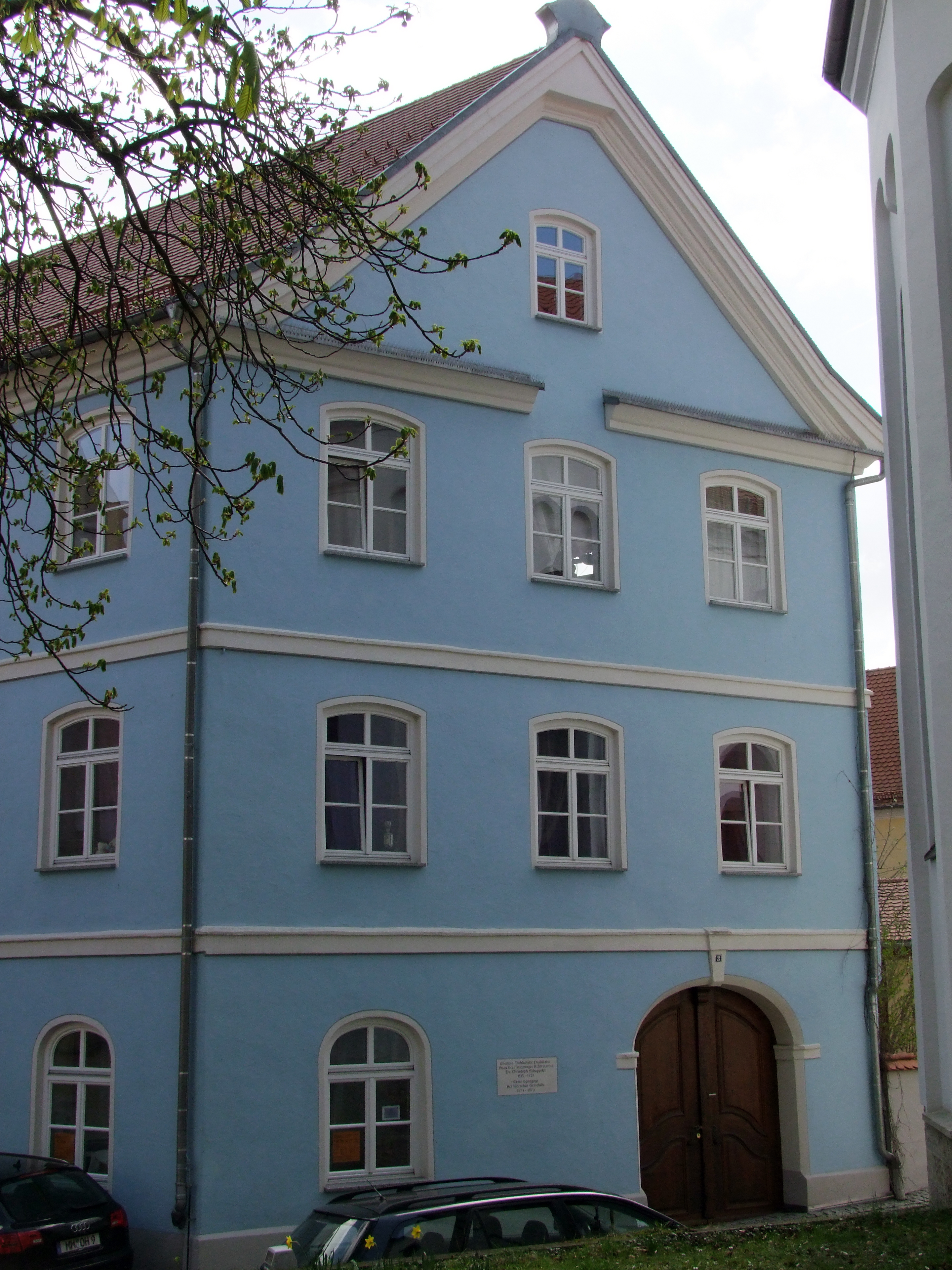 Schappeler Haus in der Fuggergasse im oberschwäbischen Memmingen.